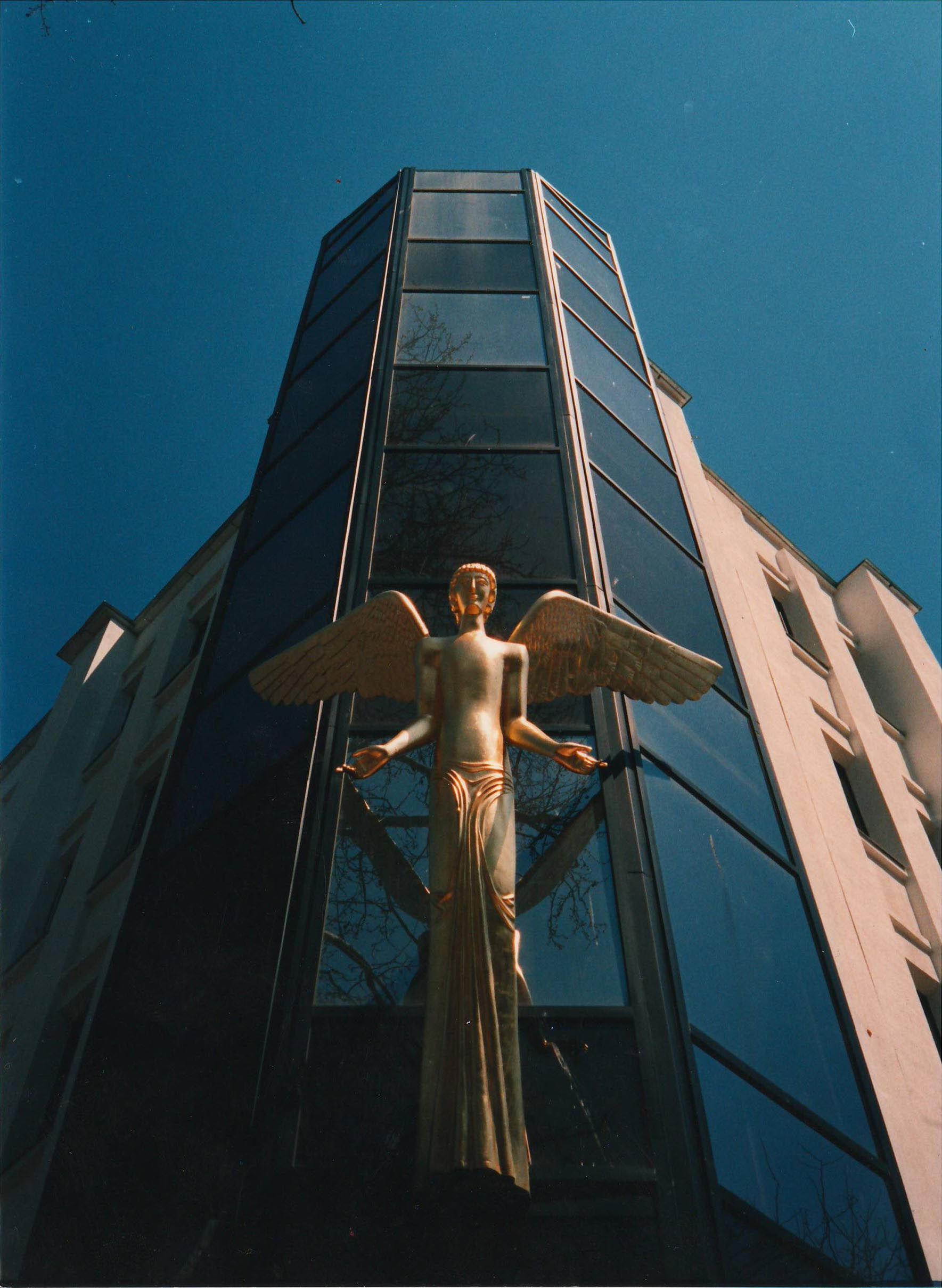 Русиньскый: фото1